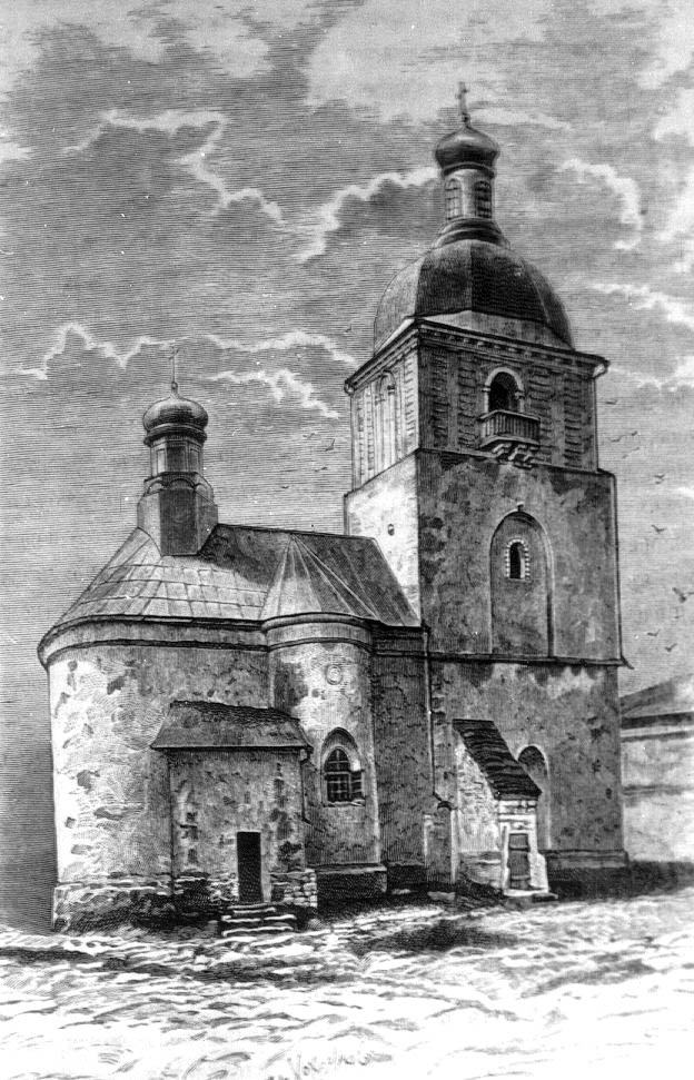 Церковь Святой Троицы в Каменце-Подольском